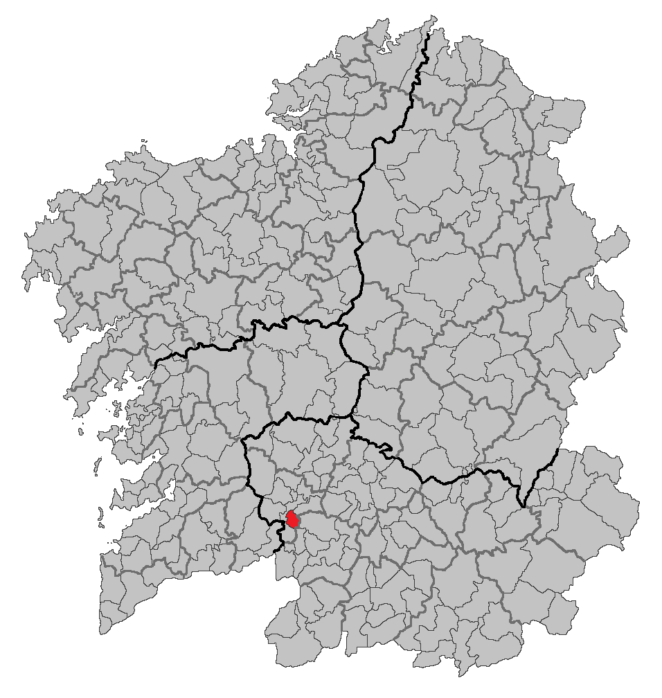 Mapa coa localización do concello de A Arnoia.